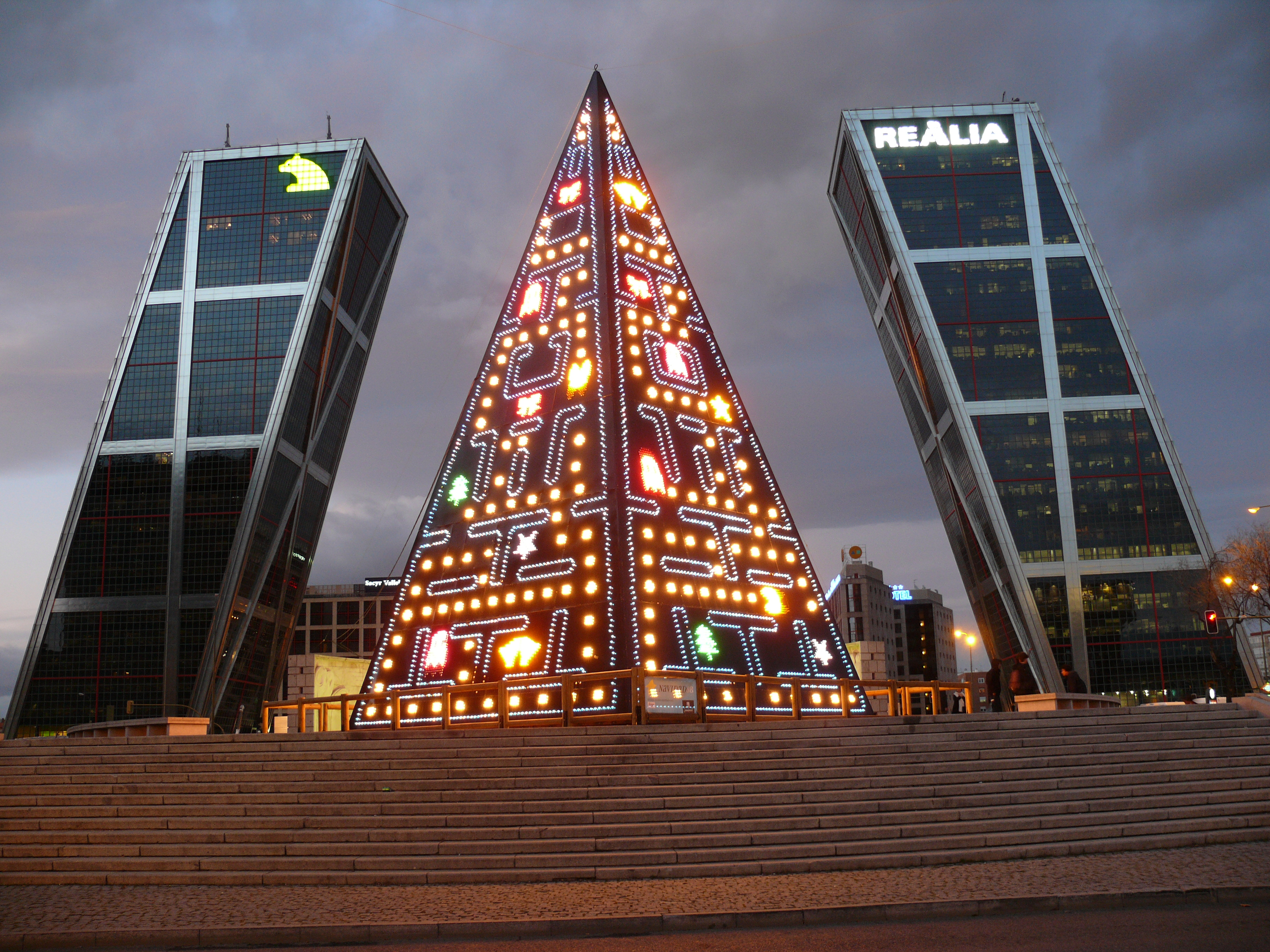 cc-by-3.0